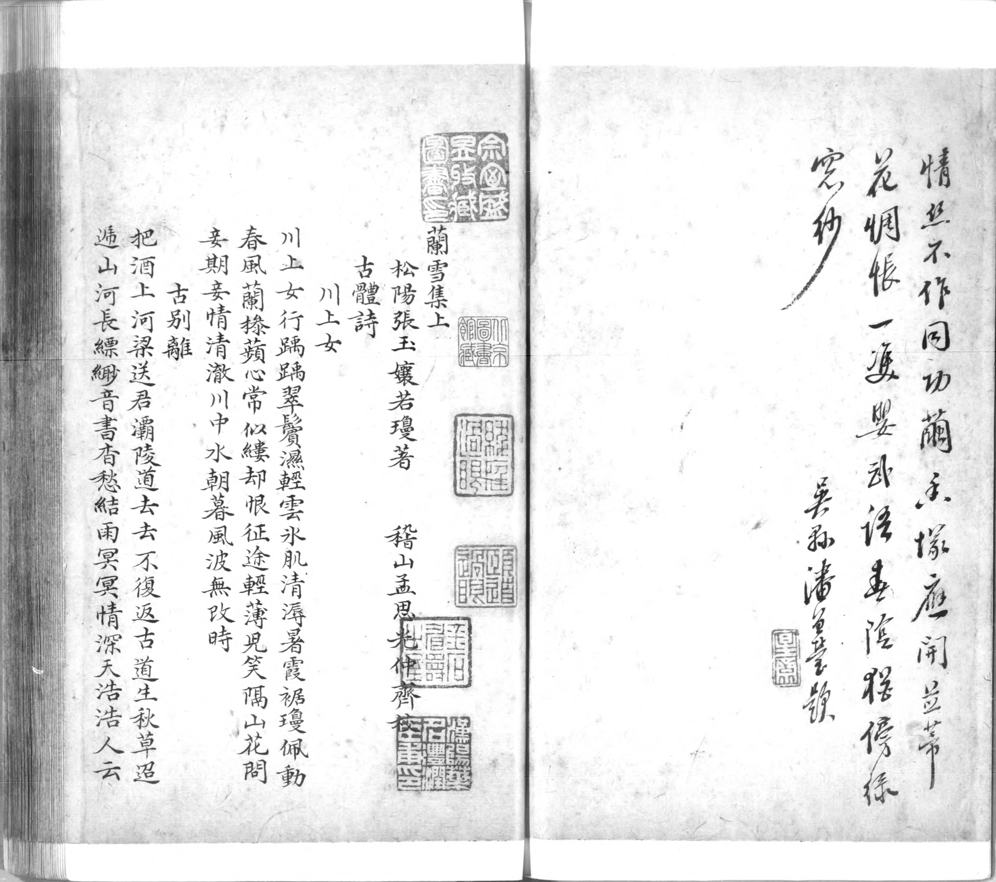 元代张玉娘《兰雪集》清代抄本书影，清陈文述跋并题诗，潘曾莹题诗。